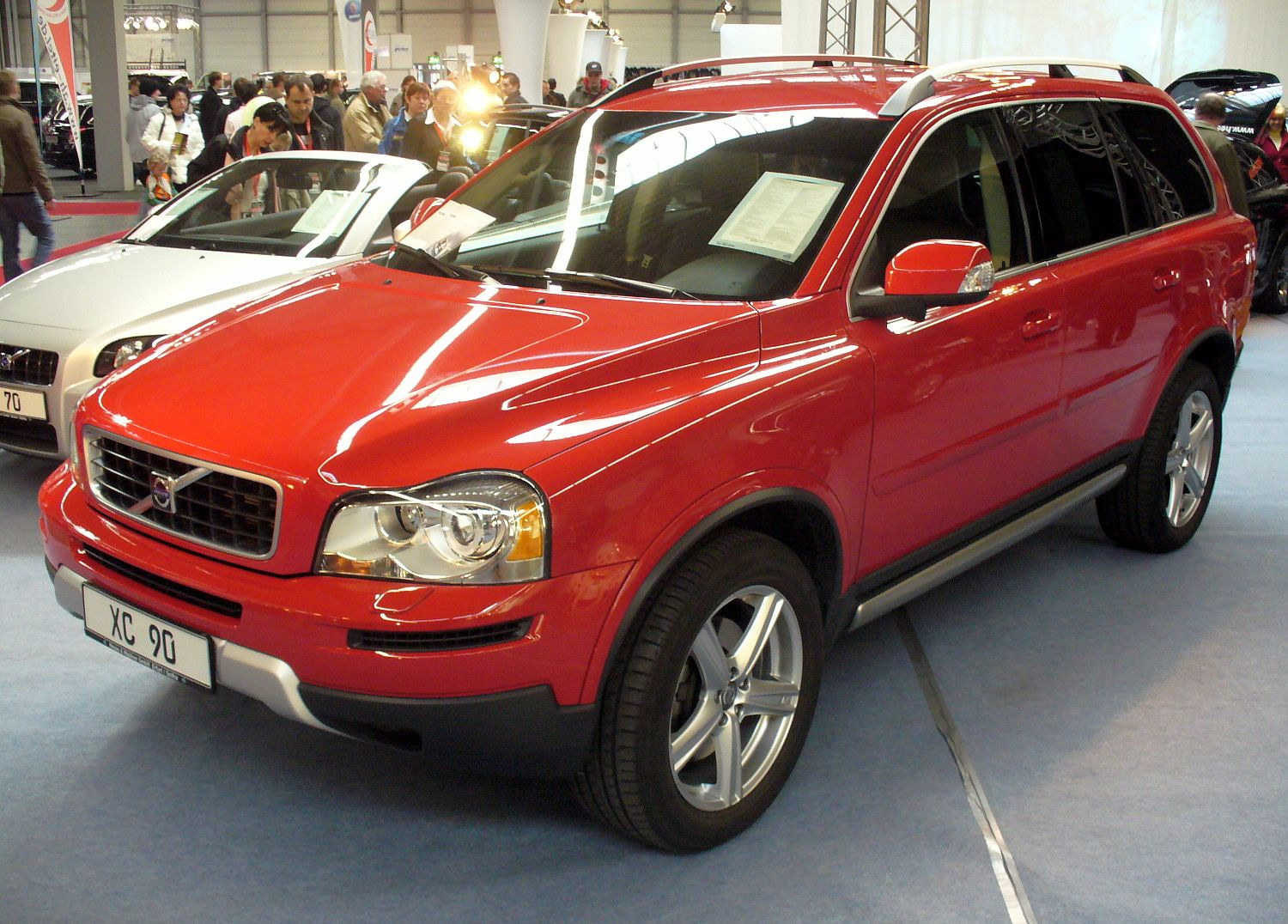 Volvo XC90 Sport